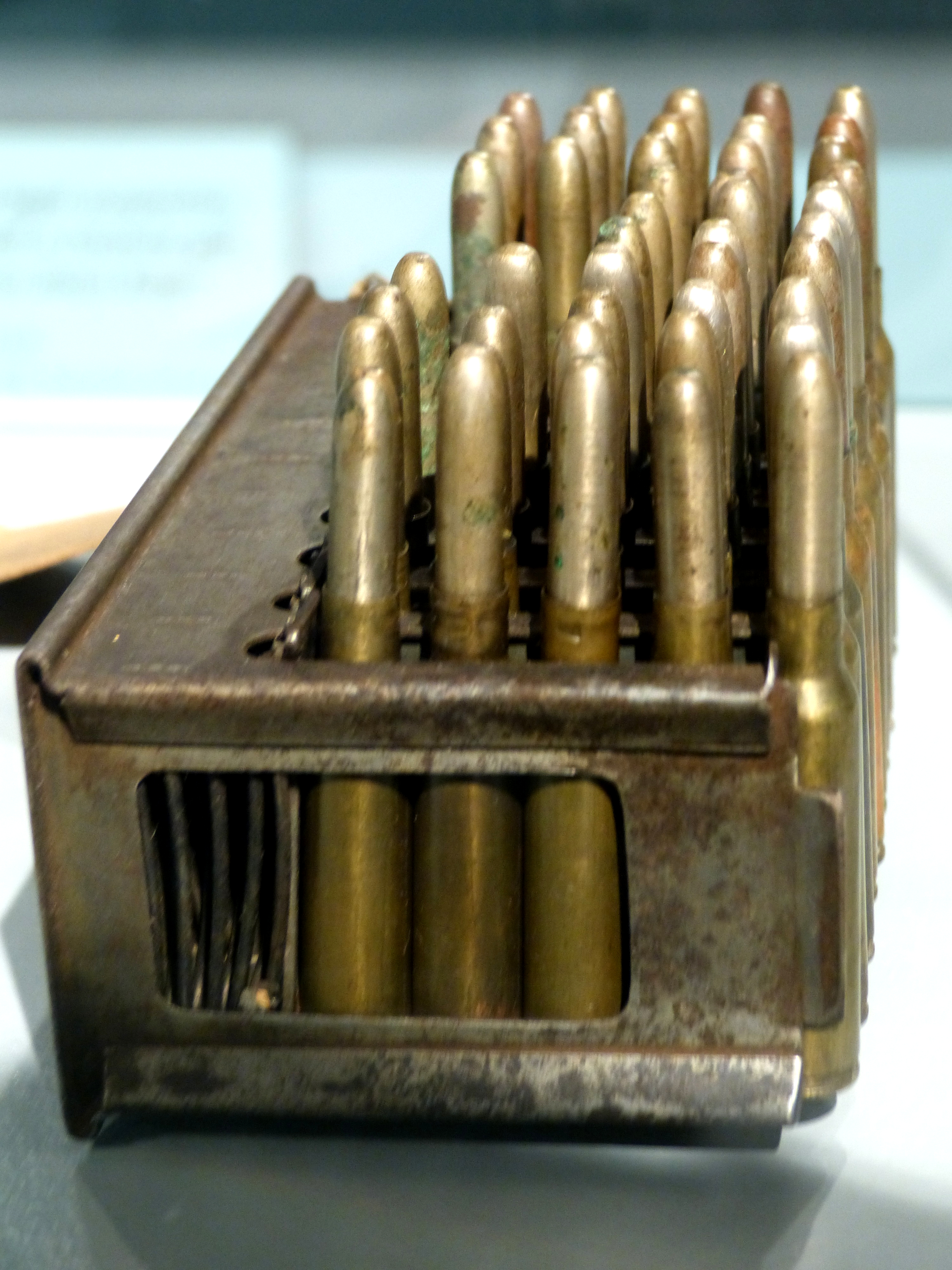 Salzburg city ( Austria ). New Residence - Salzburg Museum - Exhibition 2015 "War.Trauma.Art. Salzburg and World War I": Ammunition for a Fiat-Revelli maschine gun type 6,5 mm M1914.